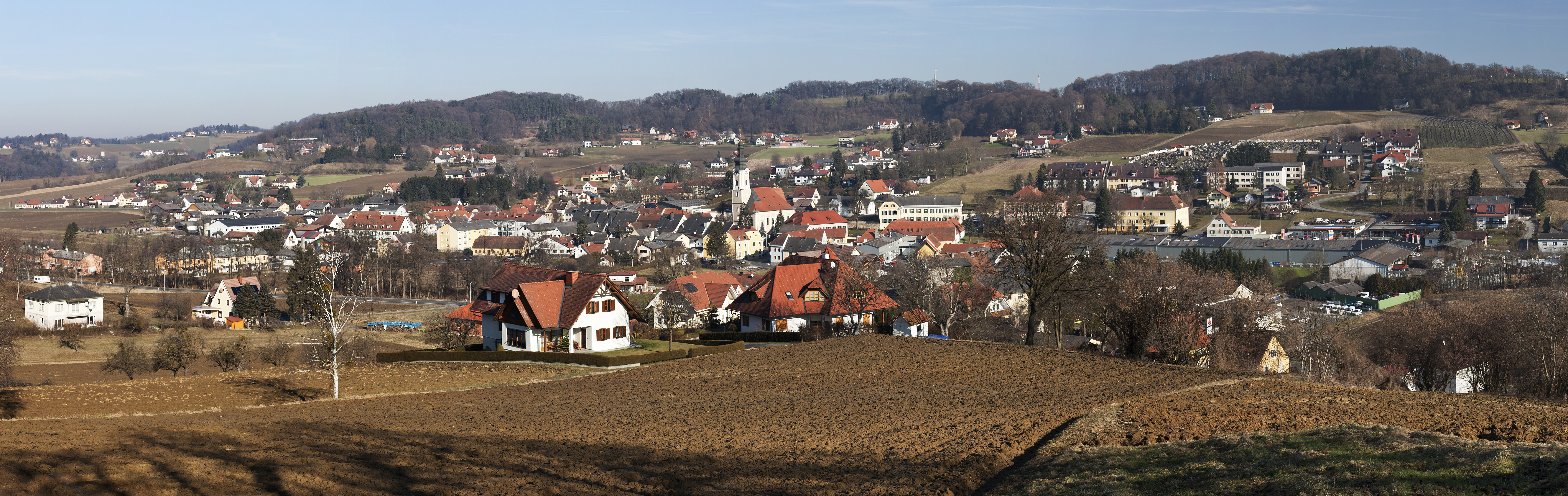 Gnas von Westen